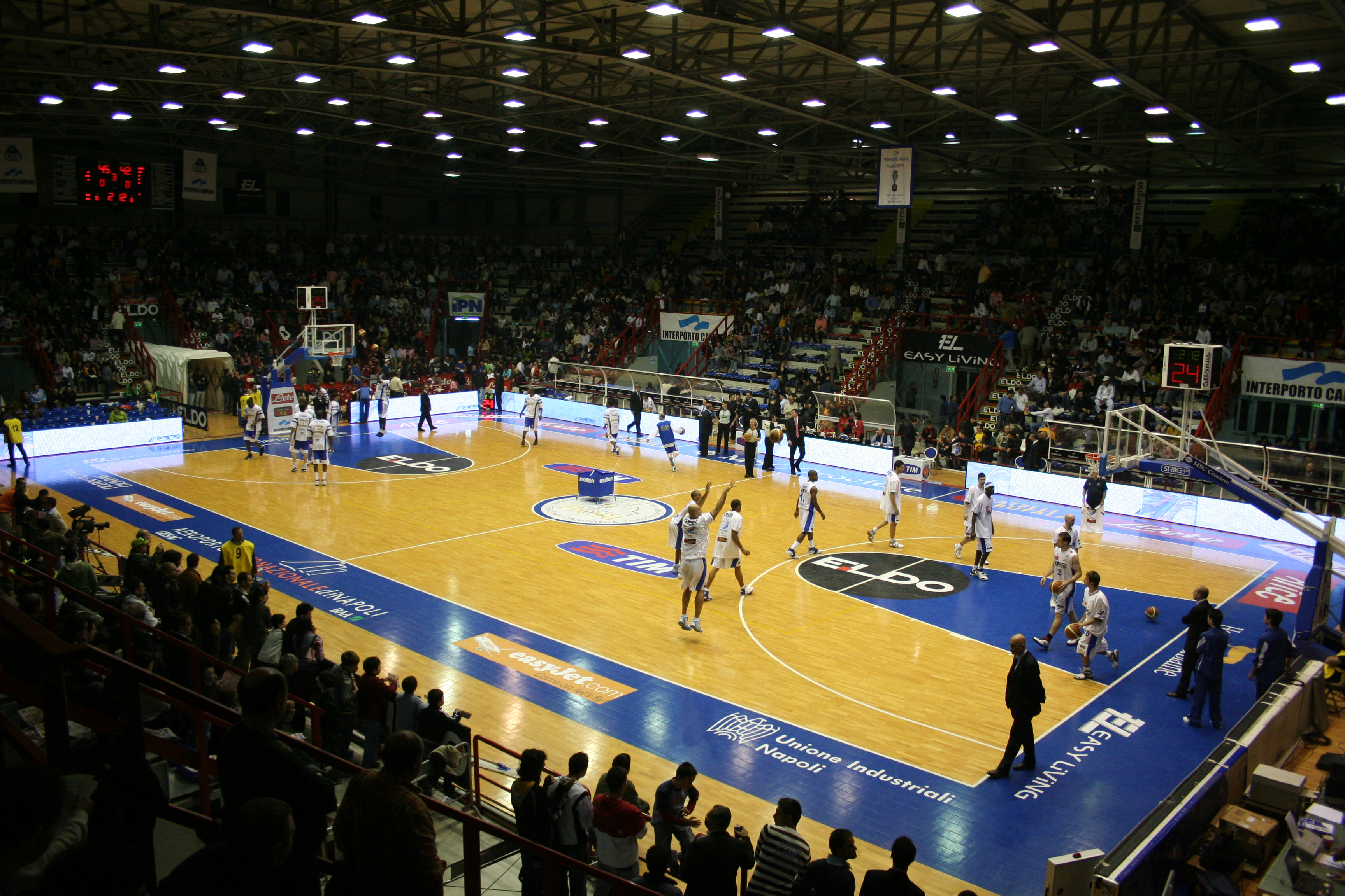 PalaBarbuto in Naples